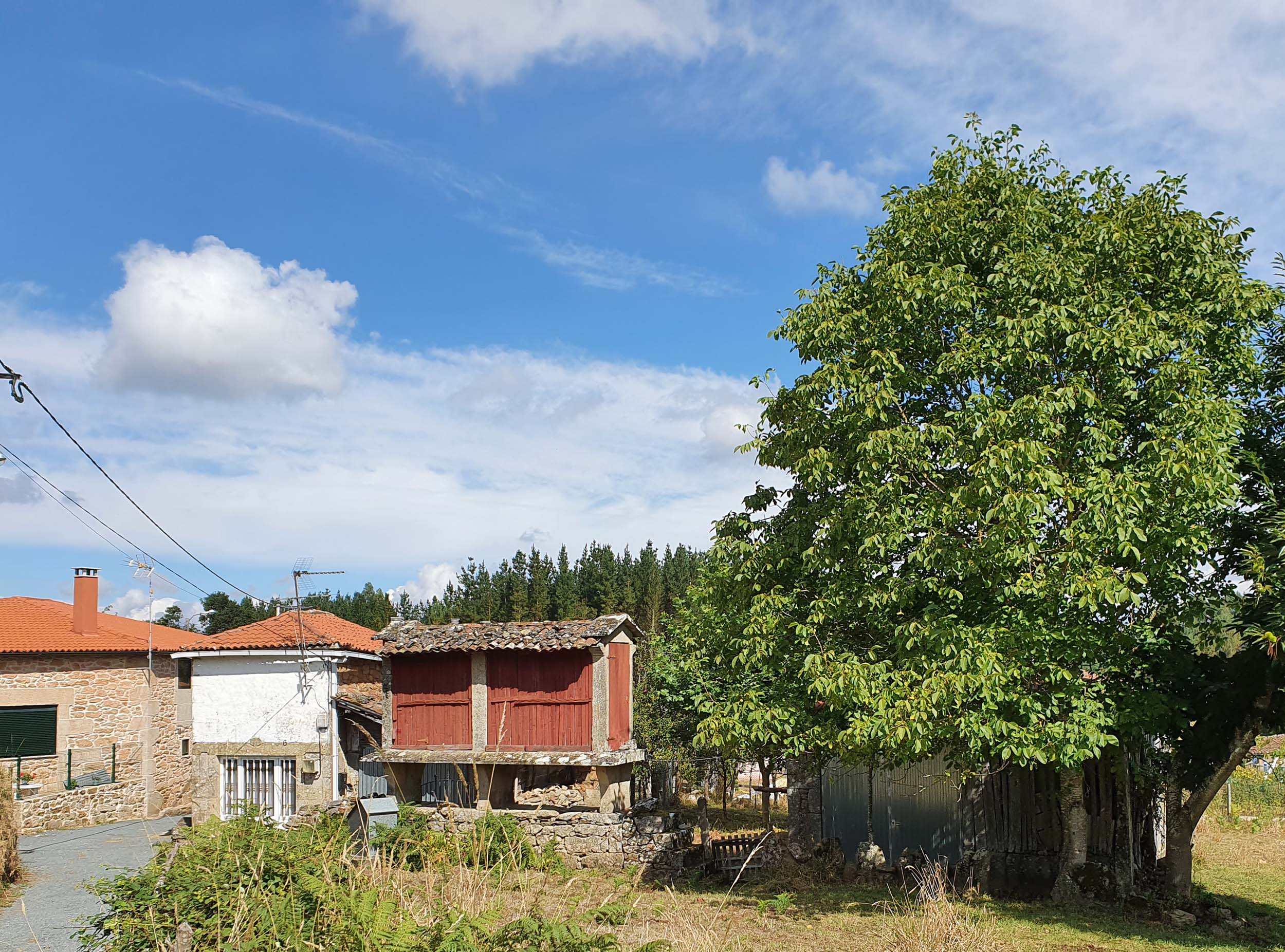 Lugar de Martín, da parroquia de Reboredo (Antas de Ulla). Aldea que dende os primeiros anos do século XXI viuse moi reacondicionada por iniciativas privadas. Así, a maioría das viviendas están restauradas e presenta unha imaxe de vitalidade. Esta aldea figura tamén como integrante da veciña parroquia de Cutián, pero logo das consultas feitas con personas maiores da zona, quédame constancia de que pertence a Reboredo.